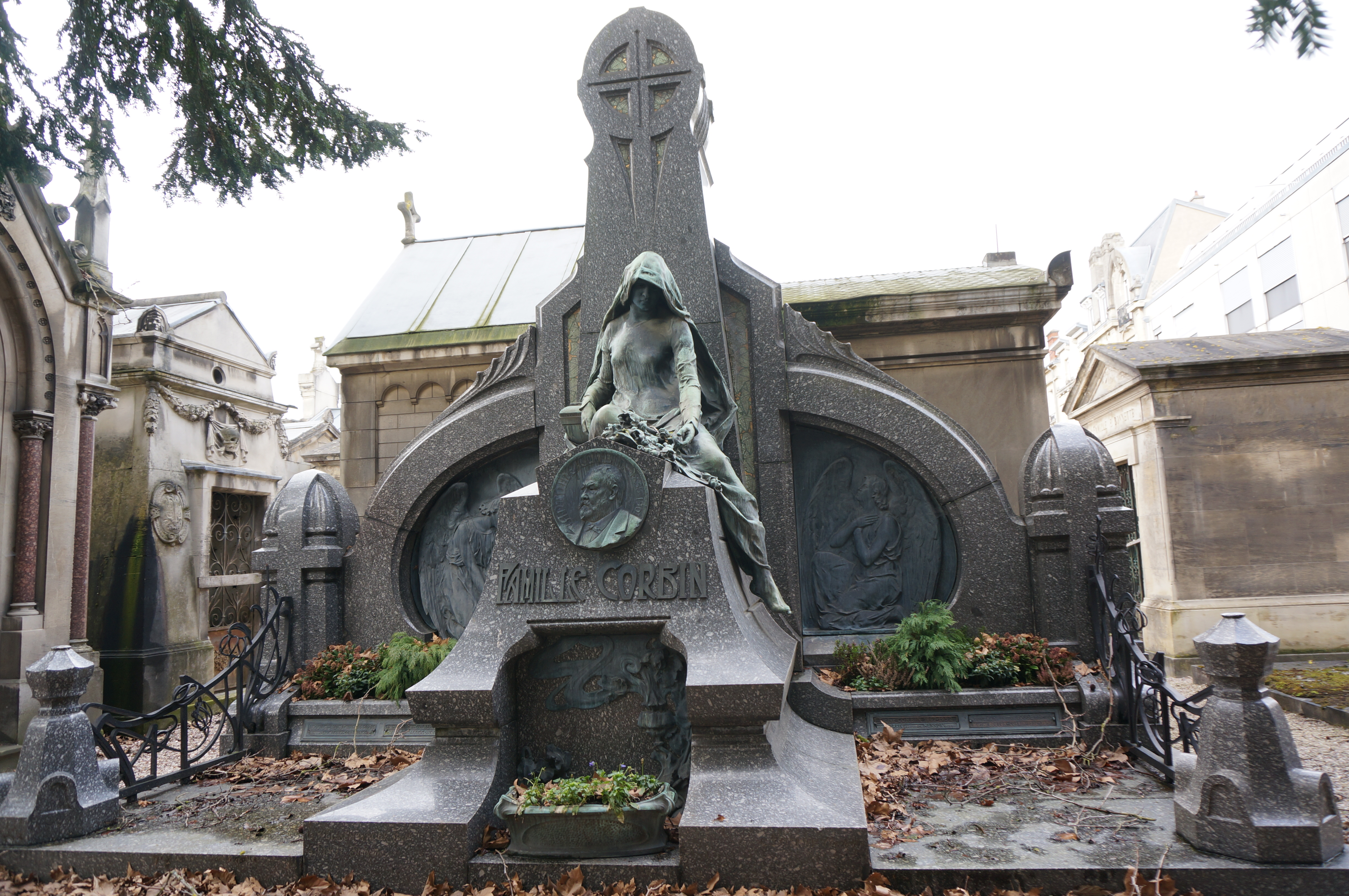 Visible au Cimetière de Préville.